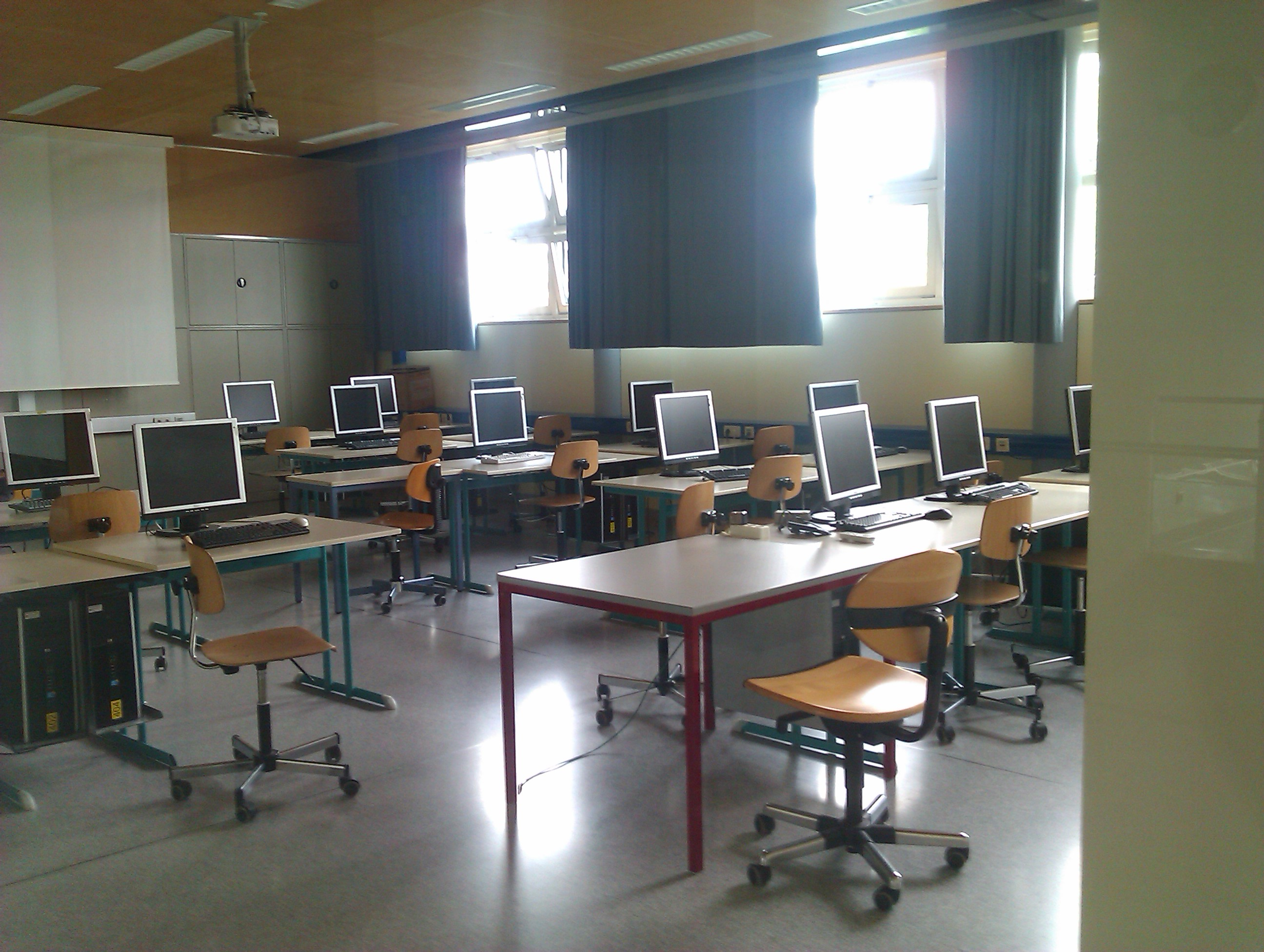 EDV-Saal in der HTBLA Kaindorf.